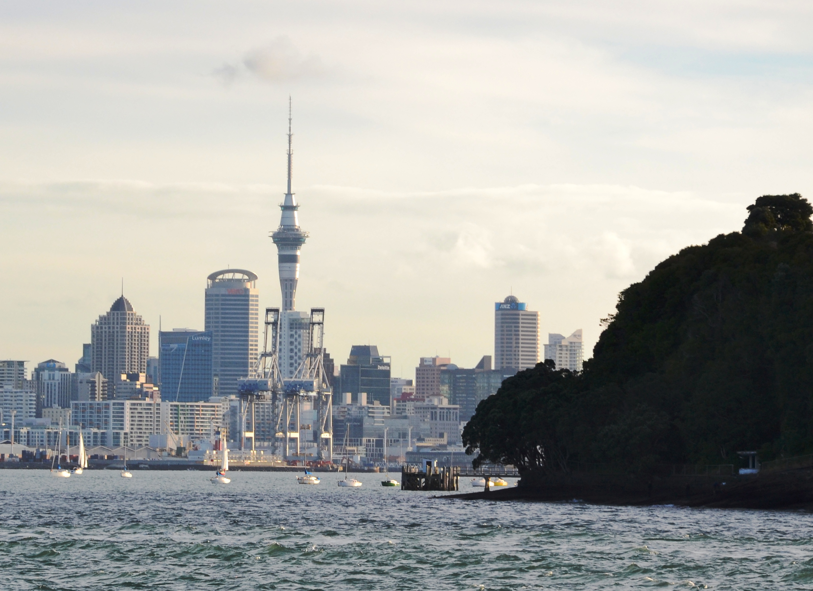 Auckland skyline